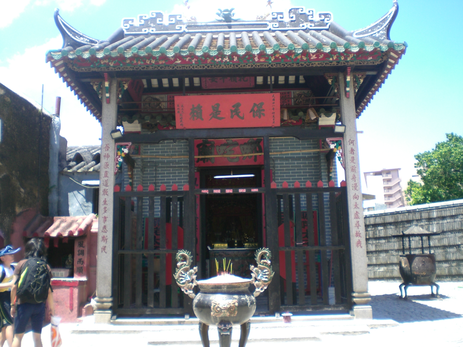 大三巴哪吒廟, Na Tcha Temple, （Templo de Na Tcha, junto às Ruínas de S. Paulo） Photo author= Mo707